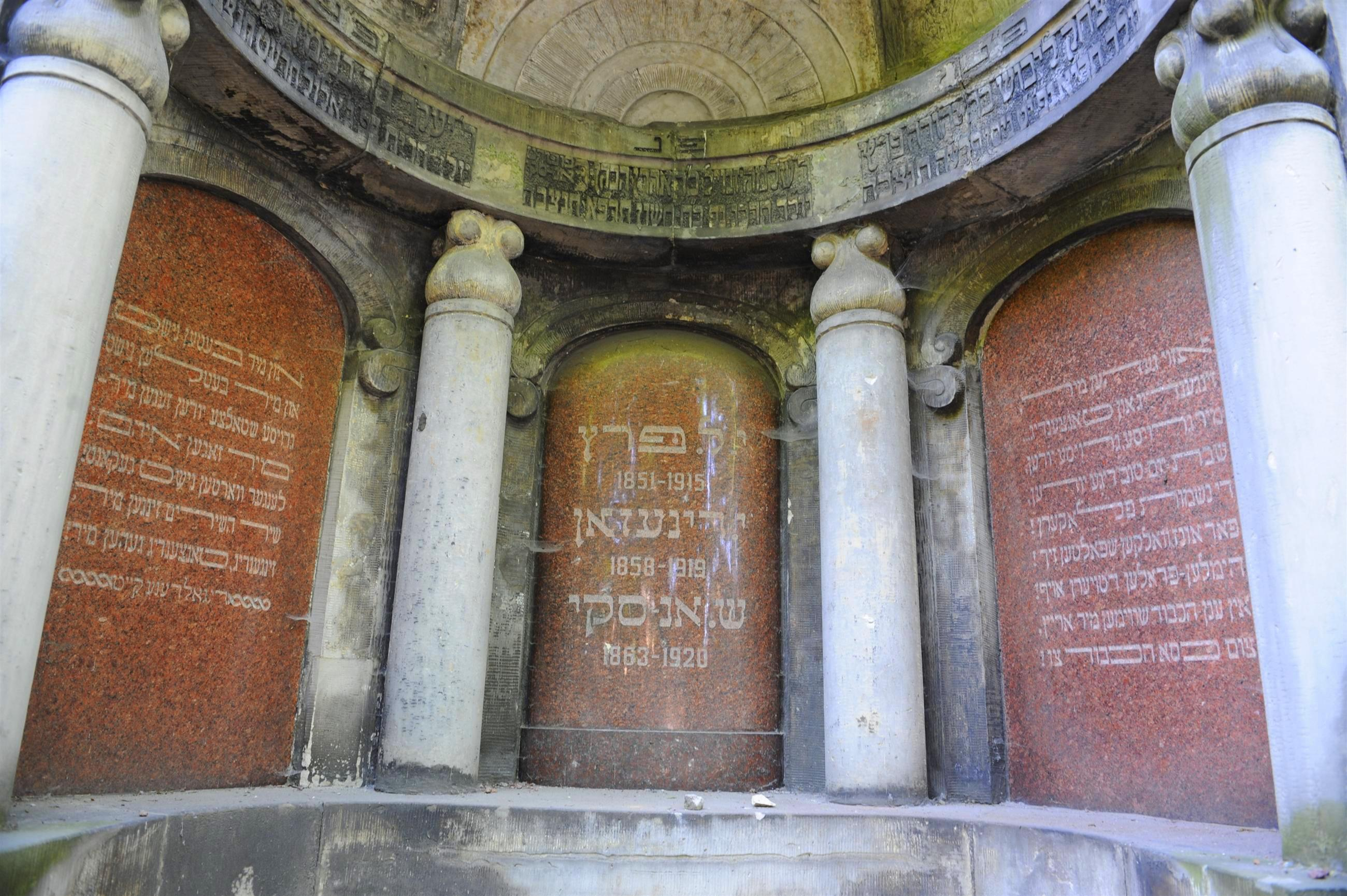 Fragment pomnika nagrobnego Mauzoleum Trzech Pisarzy na Cmentarzu Żydowskim w Warszawie